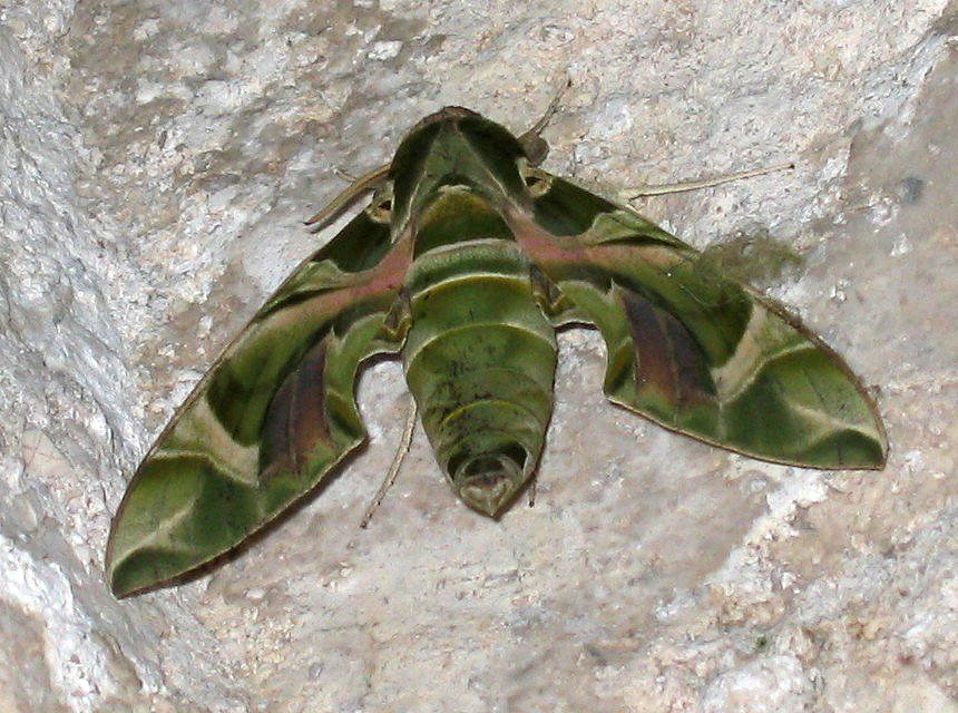 Dáphnis nérii